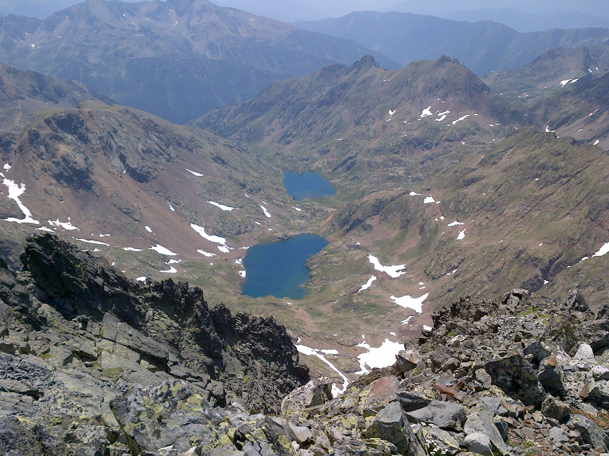 Vista dels estanys d'Estats i de Sotllo des del cim de la Pica d'Estats